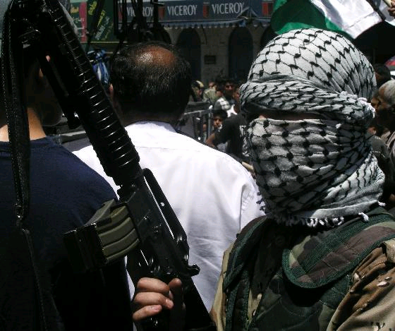 Militant